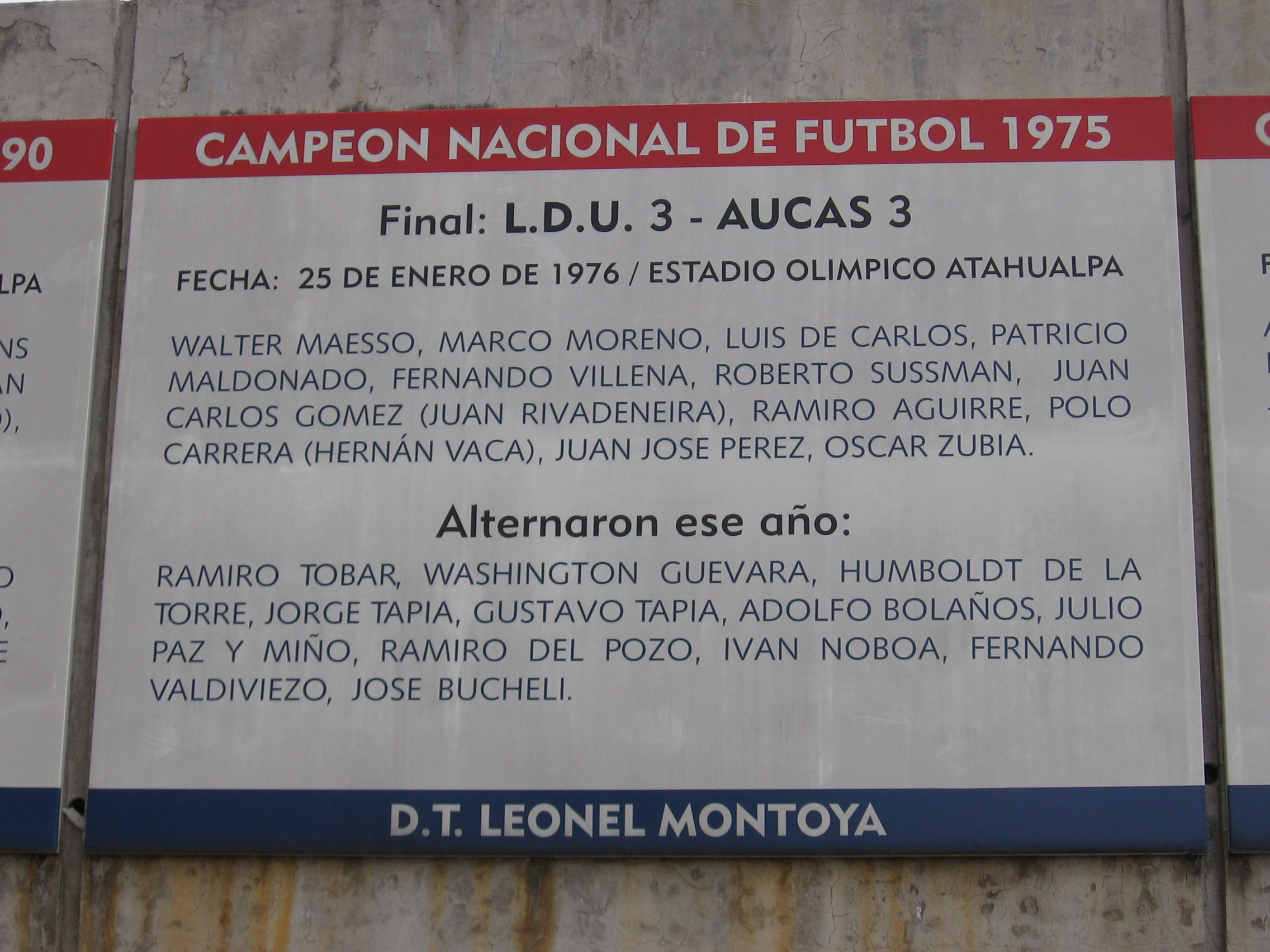 JUGADORES DE LDU 1975